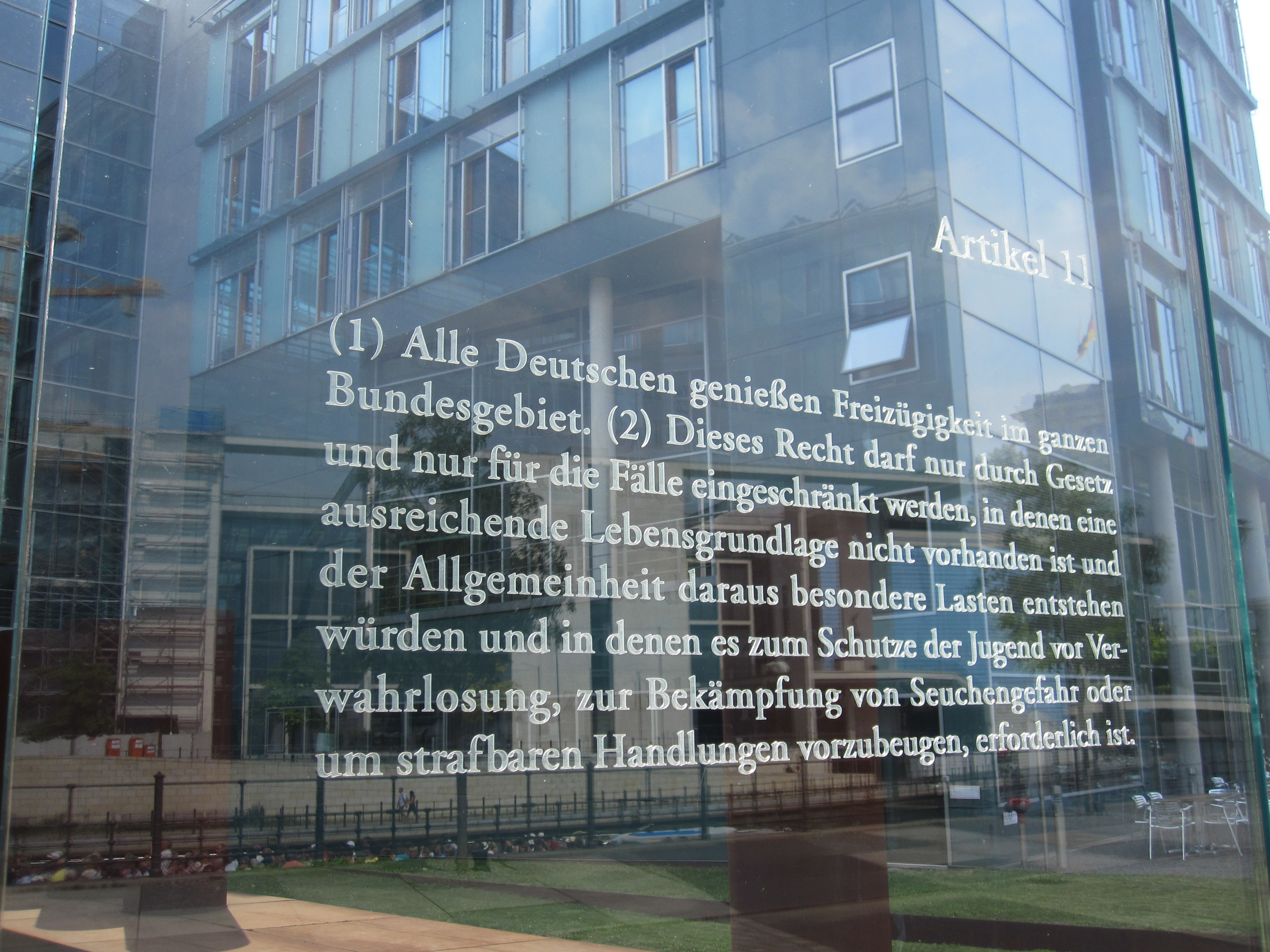 Bundestagsgebäude in Berlin: Der israelische Künstler Dani Karavan hat in drei Meter hohe Glasscheiben, die einen Außenhof des Jakob-Kaiser-Hauses im Uferbereich zur Spree begrenzen, die 19 Grundrechtsartikel des Grundgesetzes mit Laser eingraviert. „Die Grundrechtsartikel schweben gleichsam in Augenhöhe vor dem Haus der Fraktionen, dem Jakob-Kaiser-Haus“ (Andreas Kaernbach, Deutscher Bundestag)